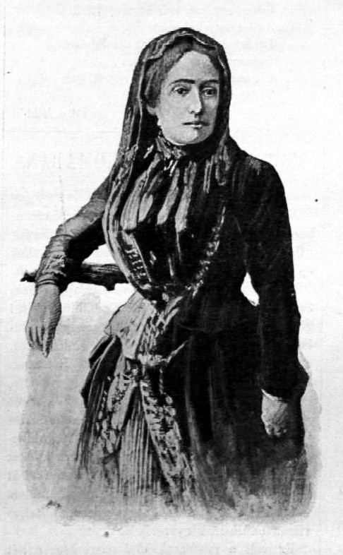 Torma Zsófia (1840–1899) az első magyar régésznő portréja